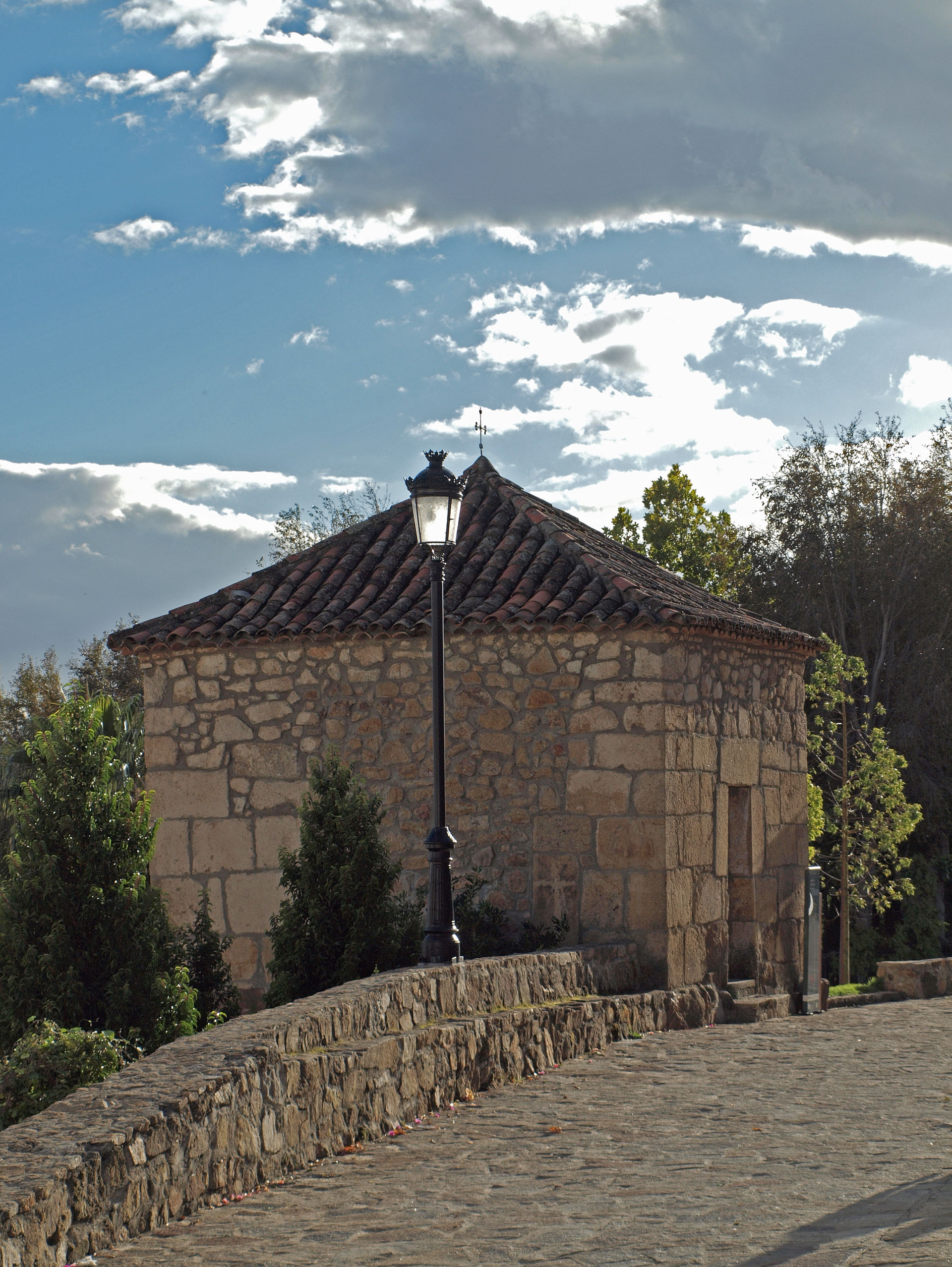 Ermita de San Roque. Losar de la Vera (Cáceres, España).